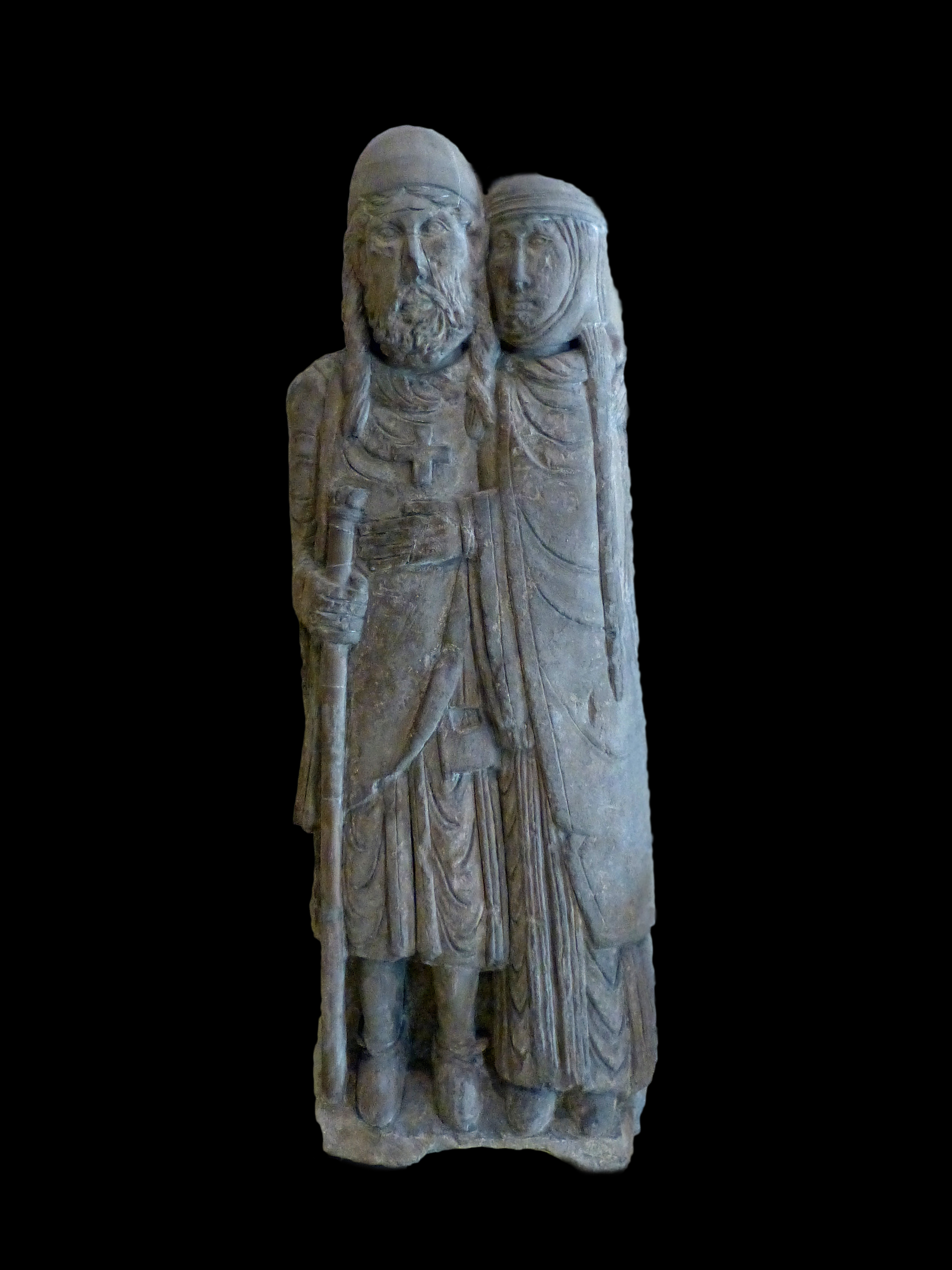 Le retour du croisé, en provenance du prieuré de Belval. Fin du XIIe siècle. Calcaire. Classé MH en 1908. Musée Lorrain.